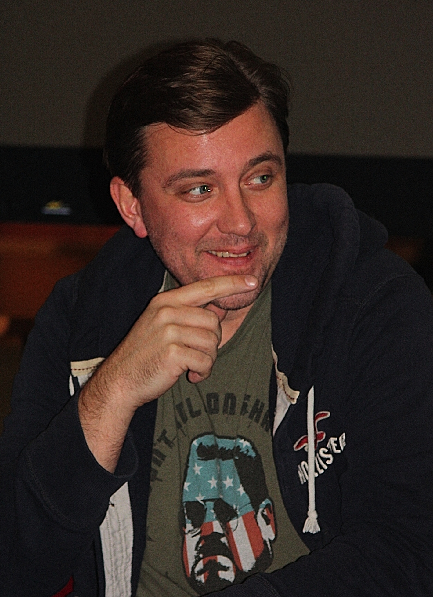 Borys Lankosz podczas spotkania w Gazeta Cafe 26 stycznia 2015 r.